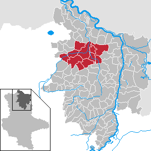 Ehemalige Verwaltungsgemeinschaft Osterburg in Sachsen-Anhalt - Landkreis Stendal